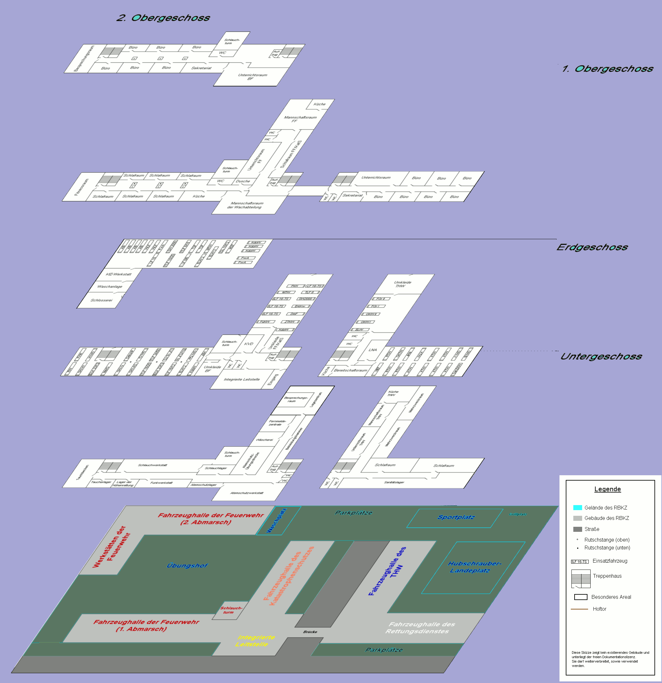 Eigene Arbeit für Bilderwerkstatt auf Basis von Bild:RBKZ.png